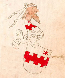 Namen und Ahnenproben der aufgeschworenen Hubertus-Ritter (niederrheinischer Adel), 53r